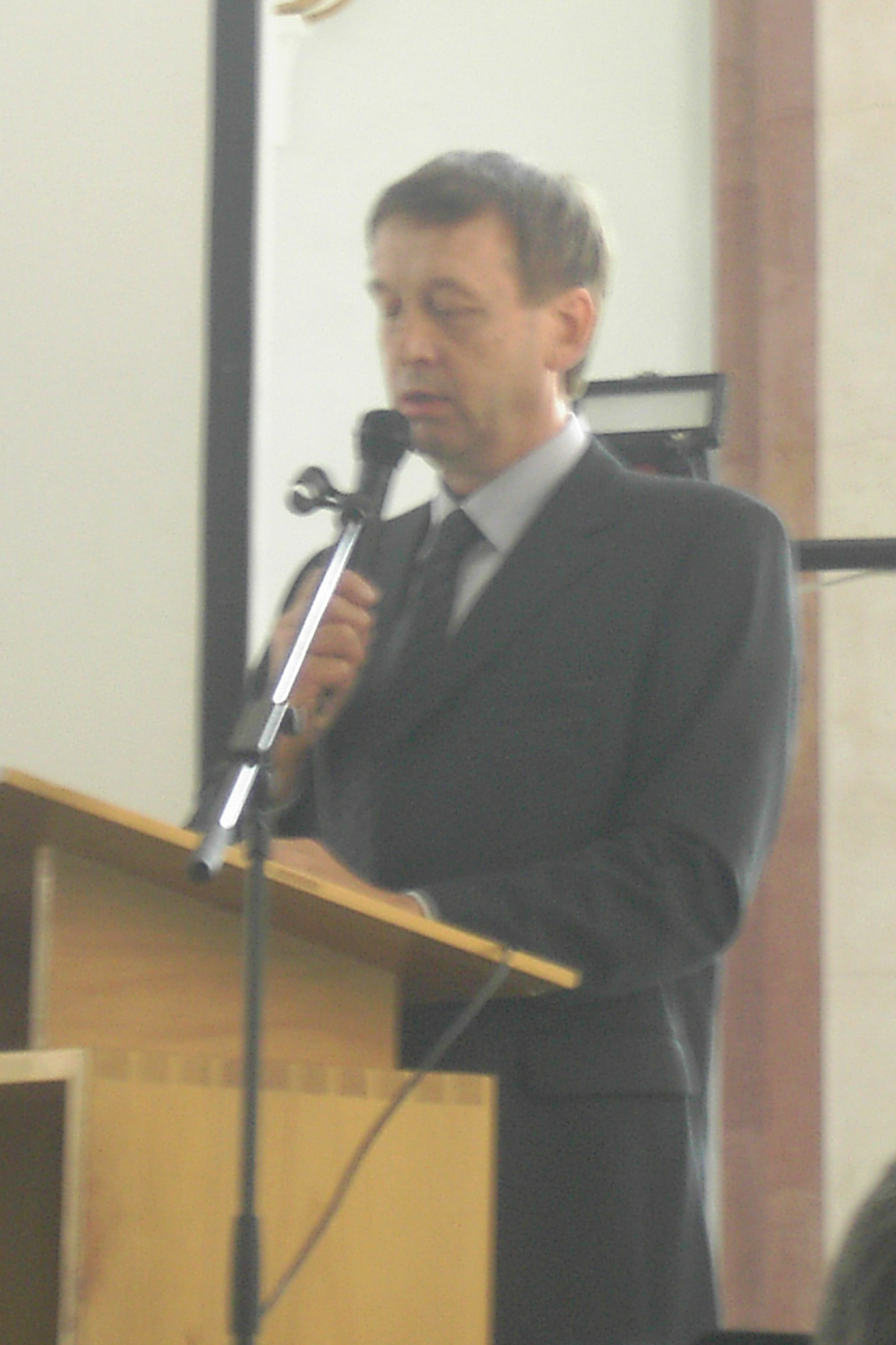 APIMONDIA-Präsident Jörgensen würdigt Ludwig Armbruster